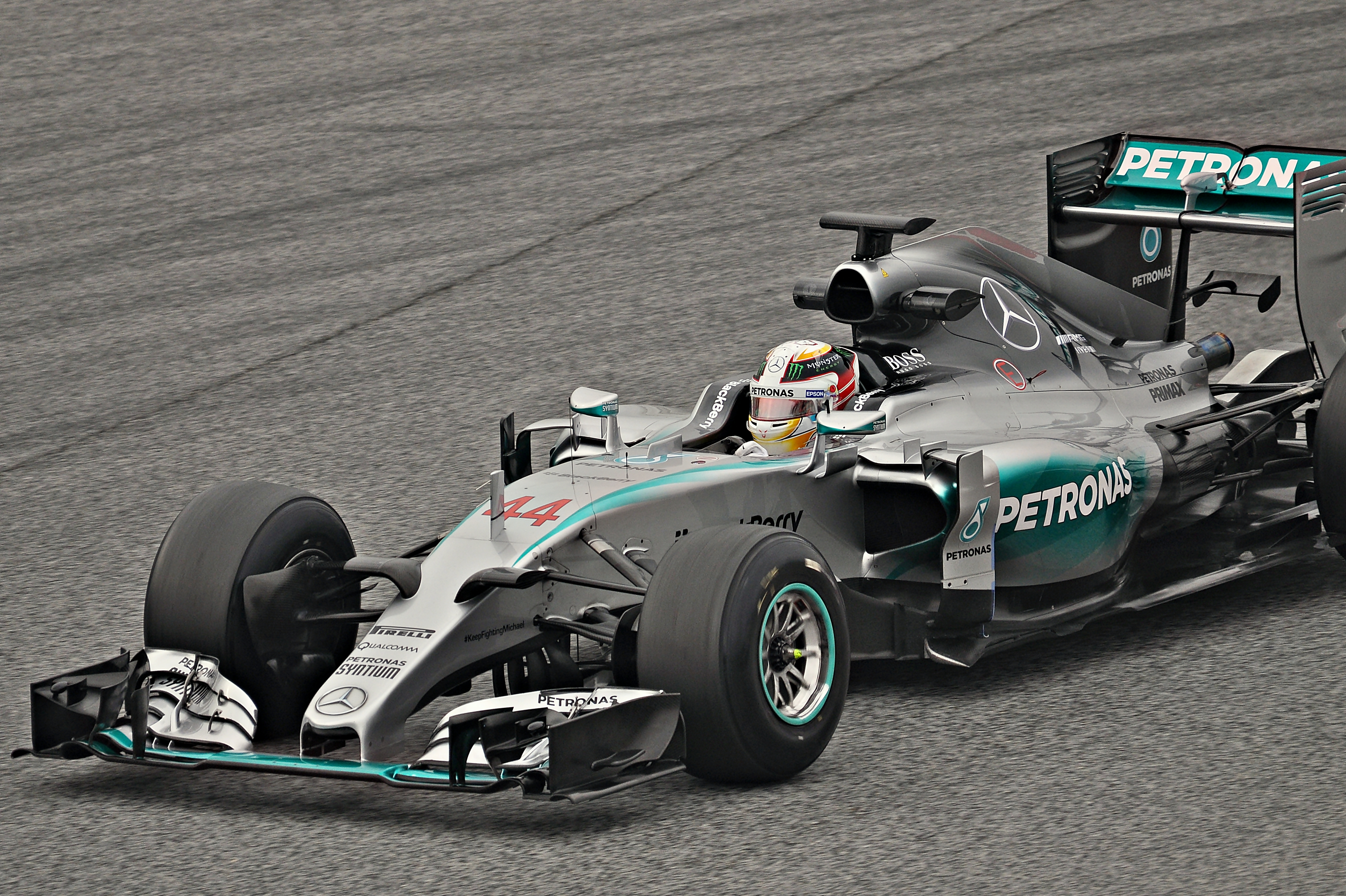 Test days Barcelona 2015